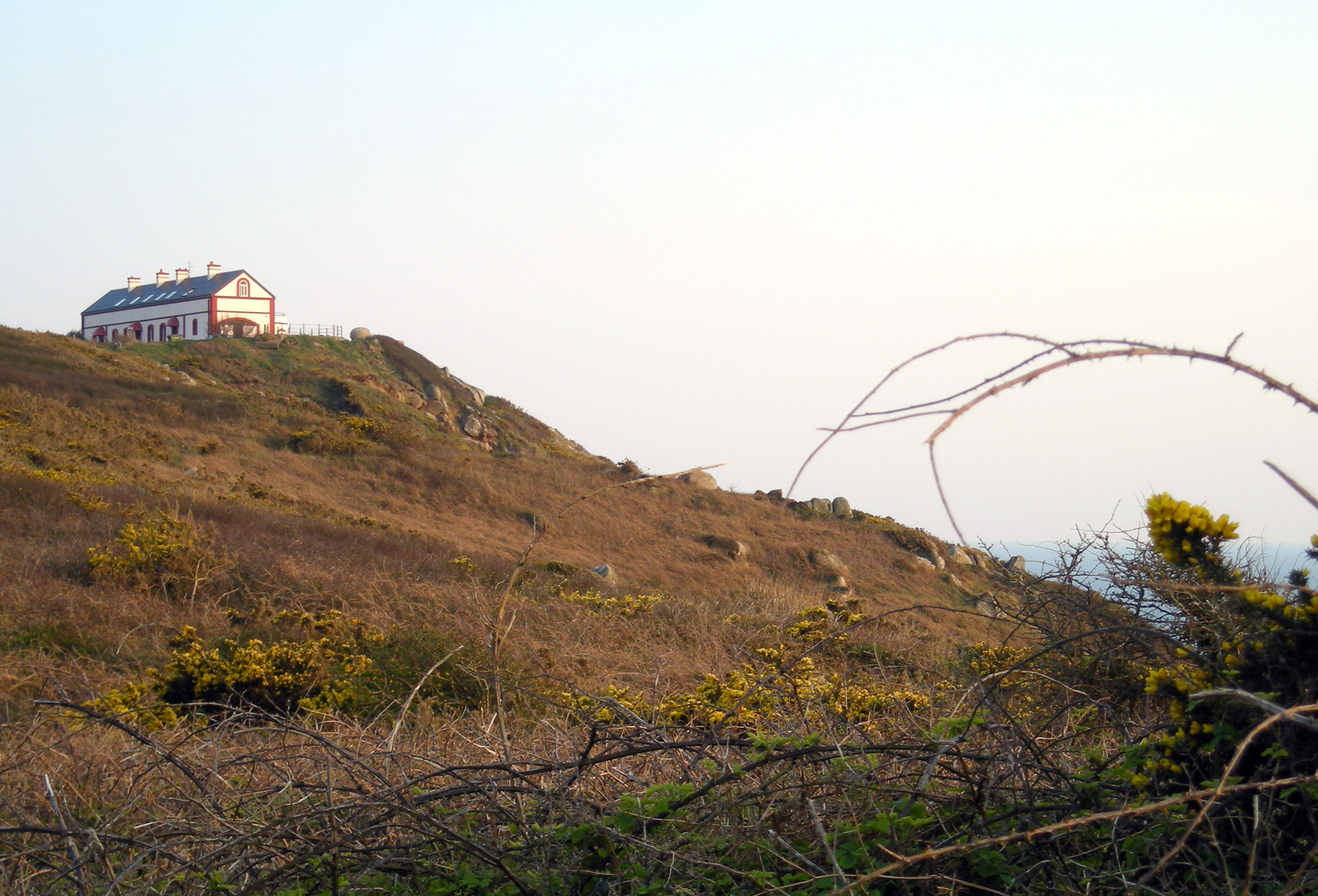 Le Sémaphore à Flamanville (Manche, Normandie, France)